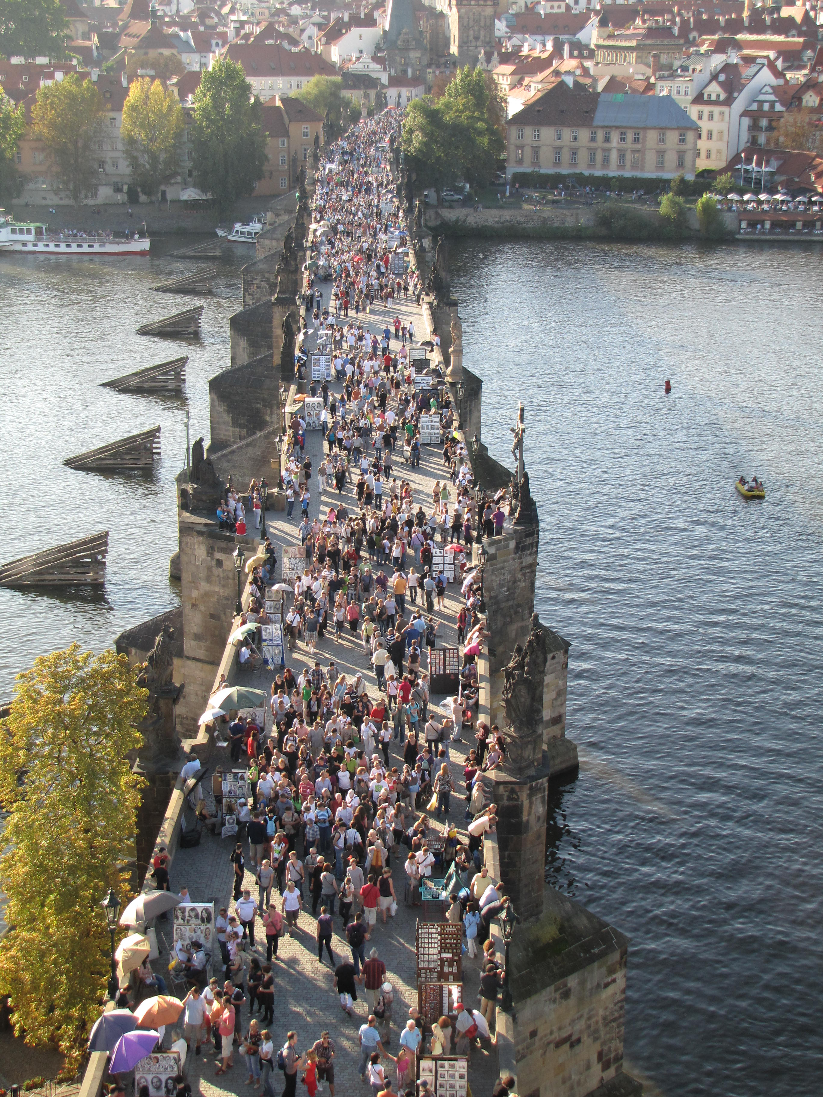 Česky: Karlův most téměř na konci turistické sezóny